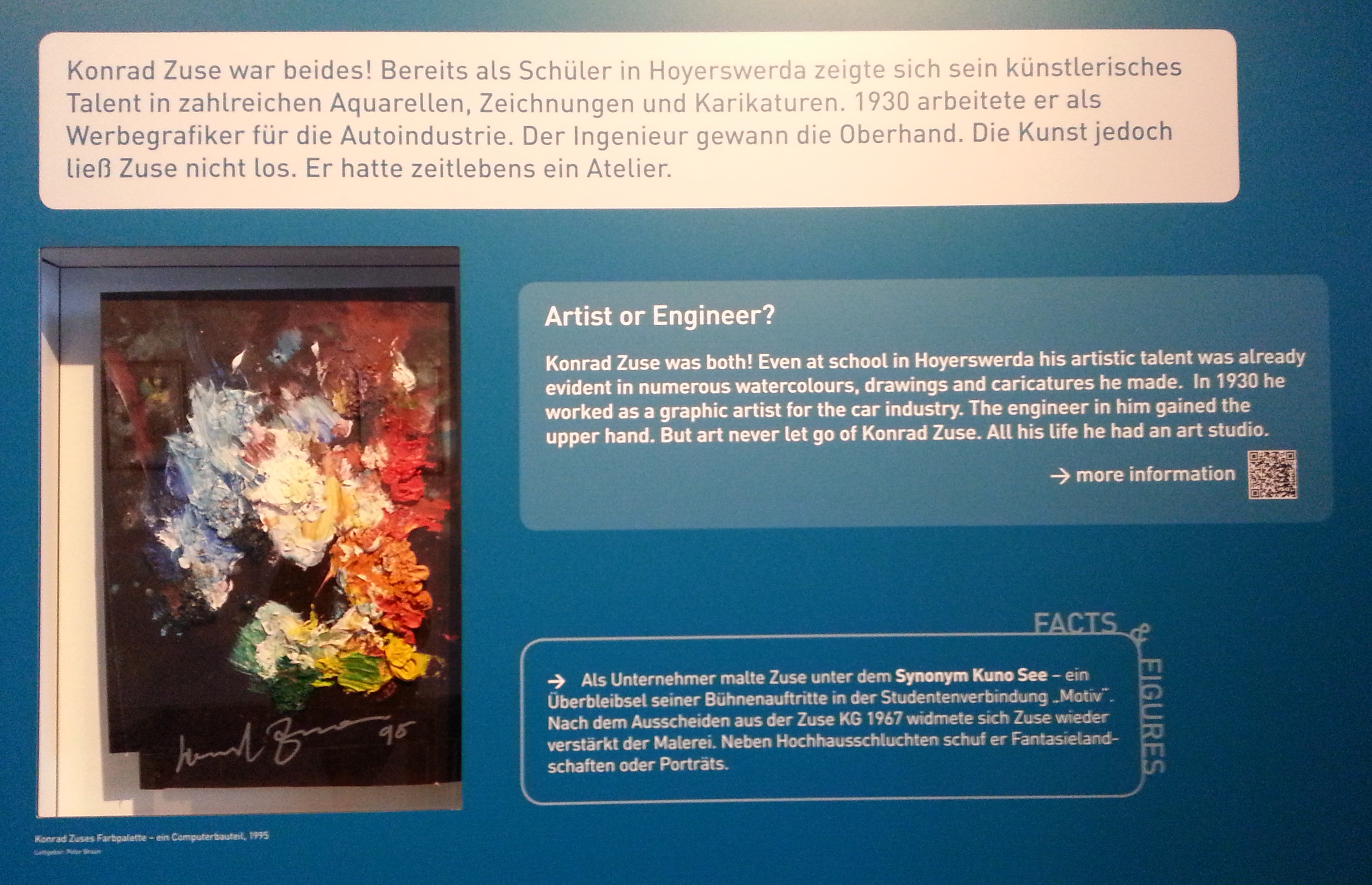 Farbmischpalette von Herrn Konrad Zuse (bestehend aus einem alten Computerteil) samt Erklärungstext in der Ausstellung des ZCOM